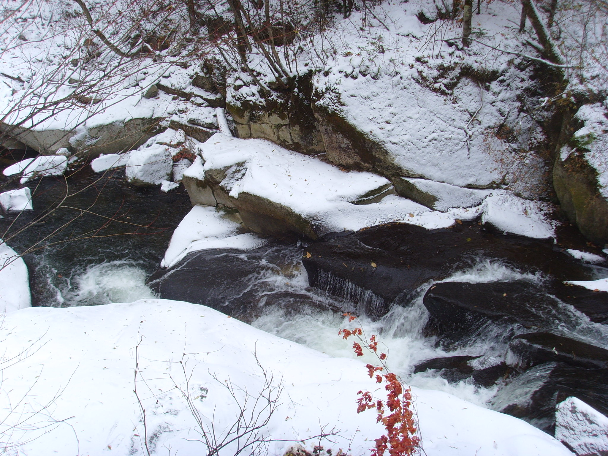 직소폭포